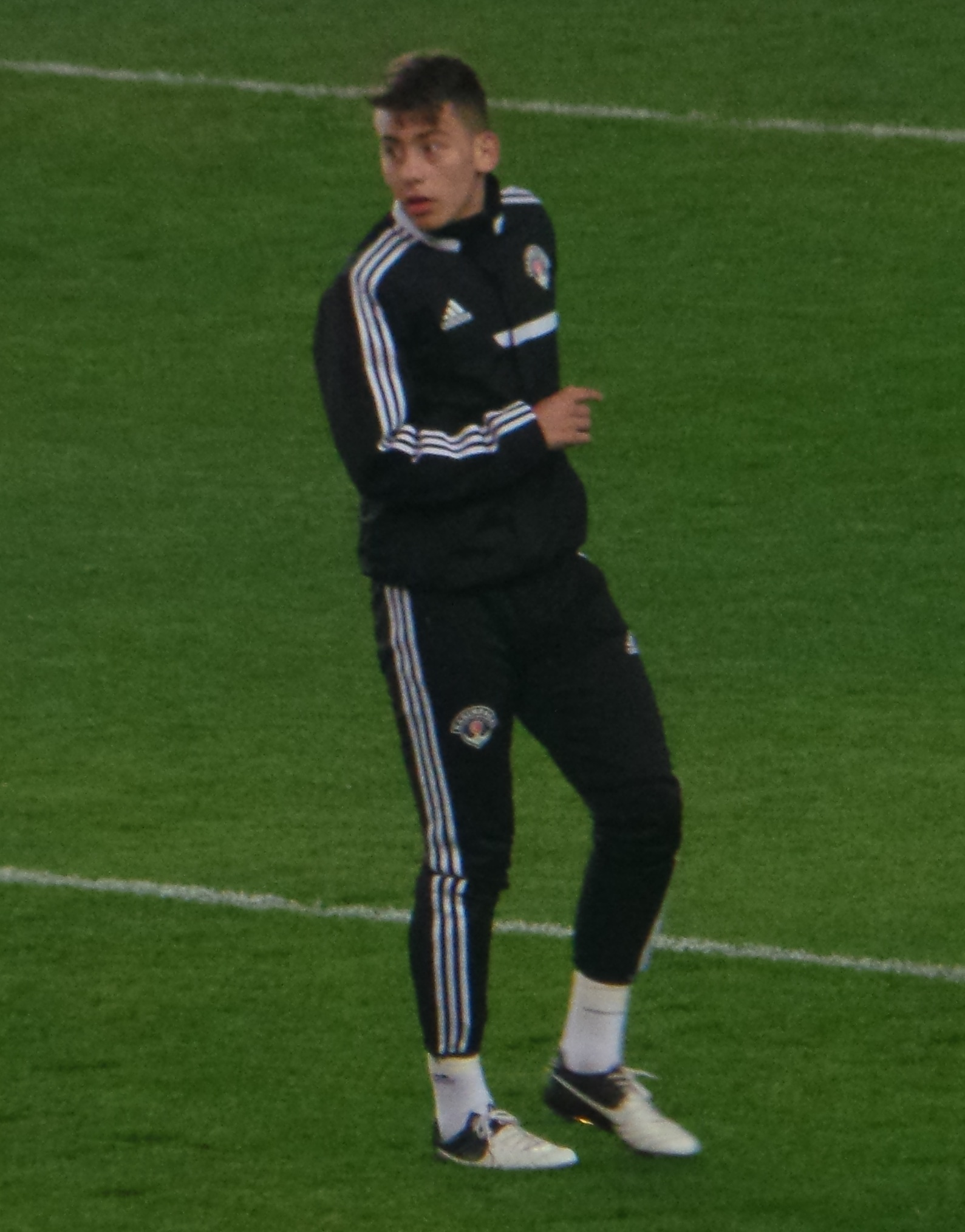 Kubilay Aktaş